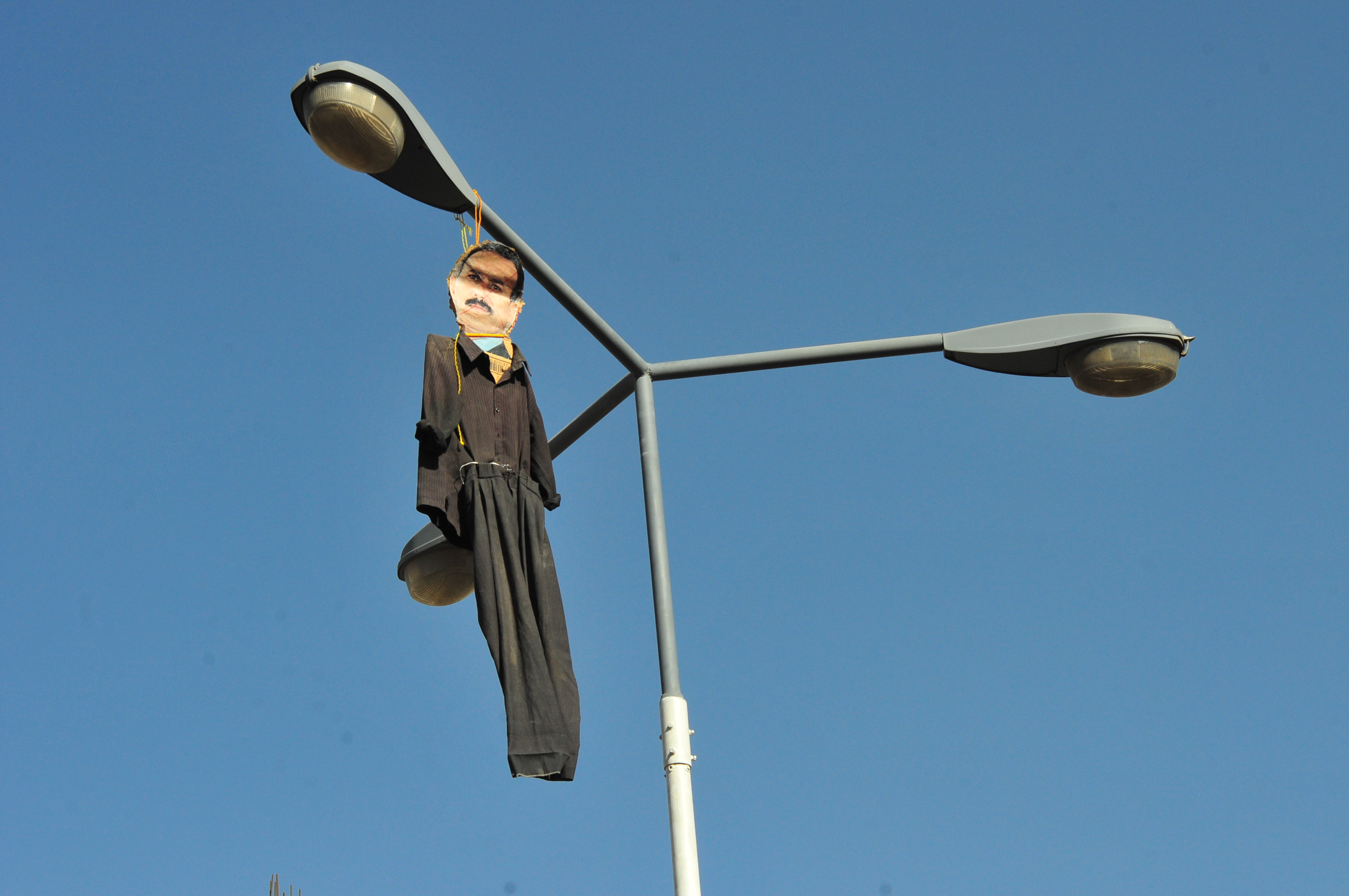 A hung puped